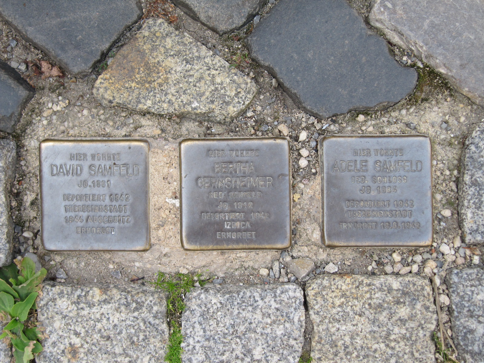 Erinnerung an deportierte jüdische Mitbürger vor ihrem ehemaligen Wohnhaus in der Herrnstraße, Ecke Klostergasse